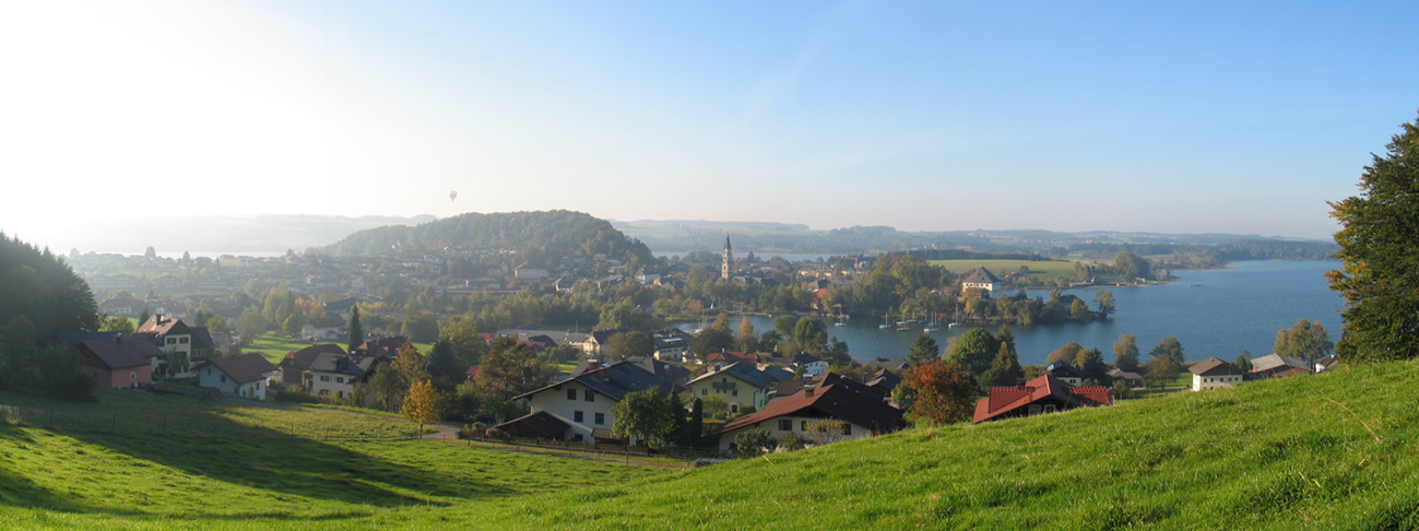 Ort und See Mattsee Richtung Westen, hinterbei Obertrumer See und Haunsberg